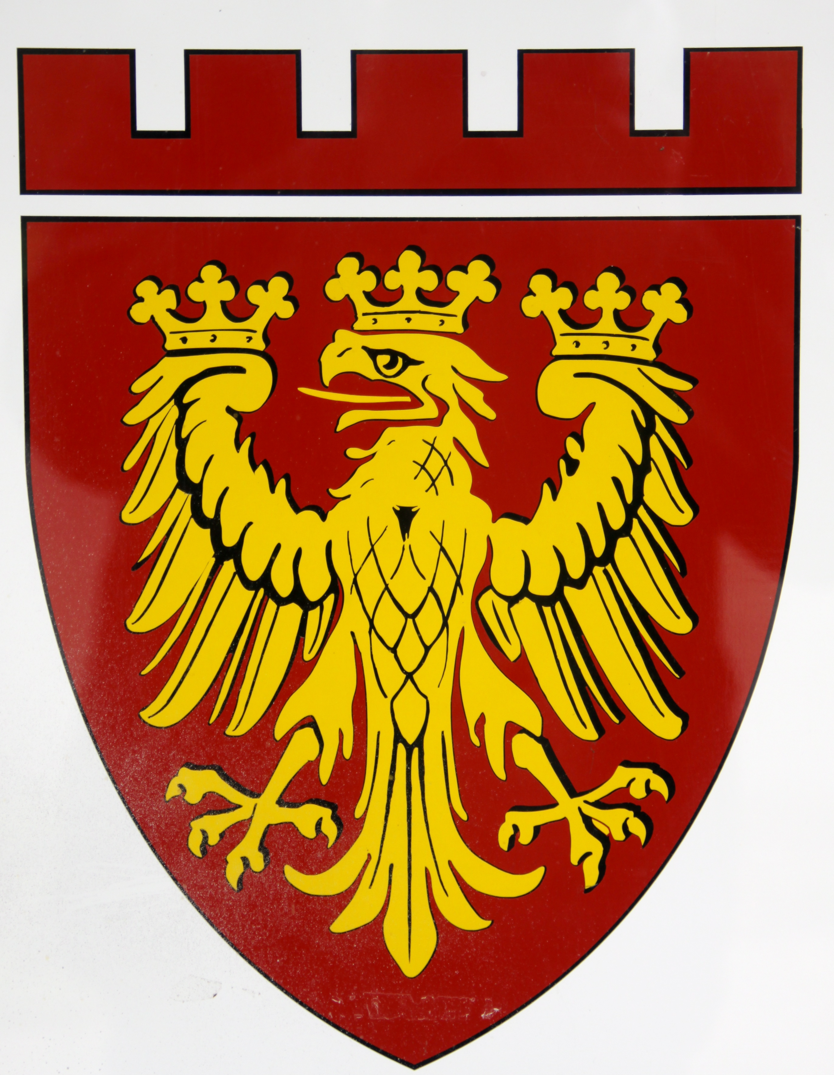 Wappen von Oldeborg